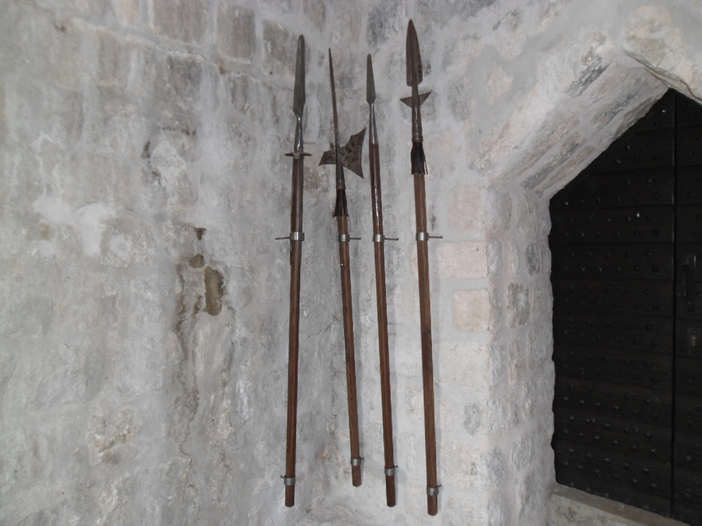 prizor iz Sokol-grada u Konavlima